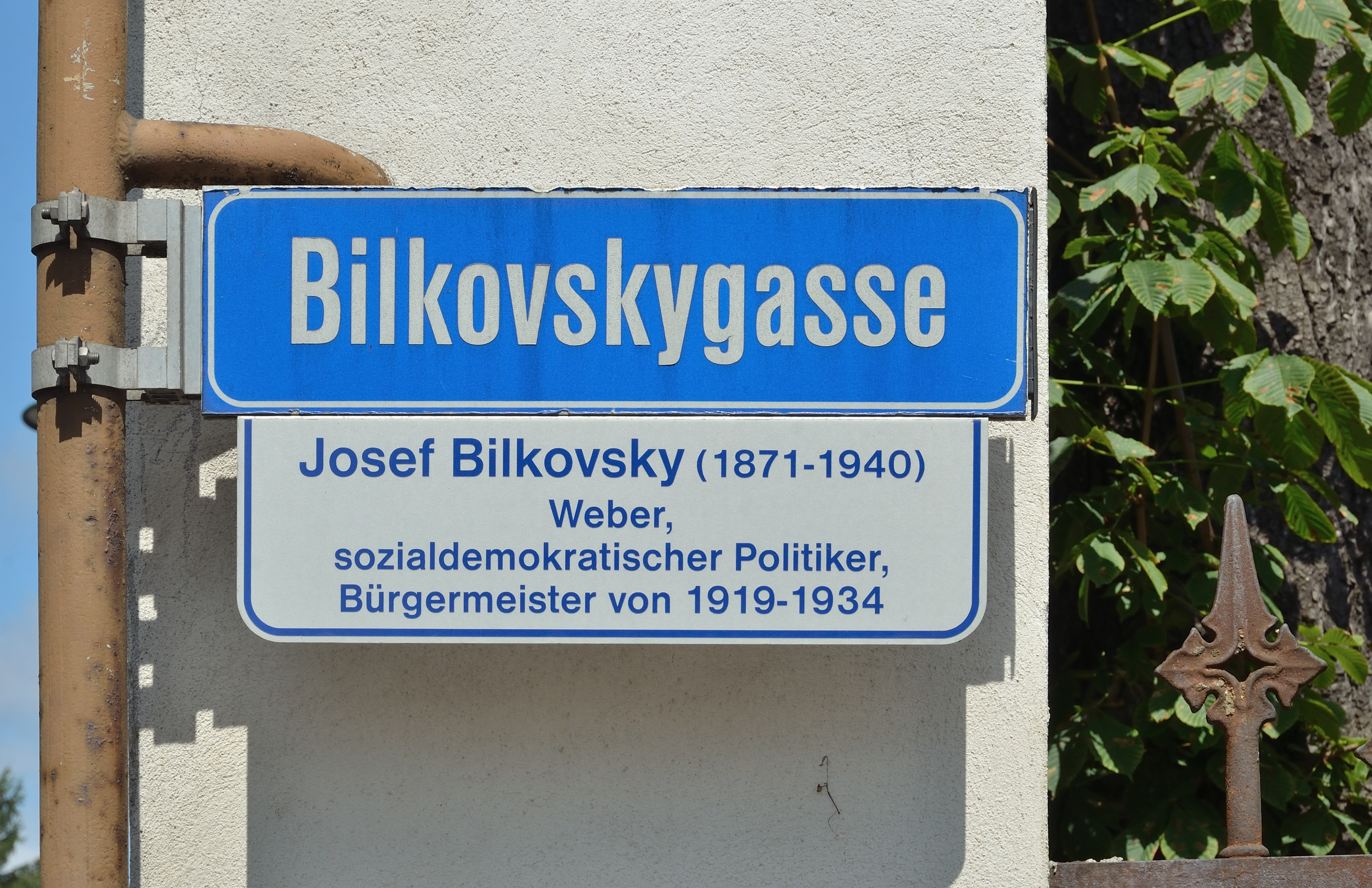 Straßenschild Bilkovskygasse (nach einem ehemaligen Bürgermeister), typisches Straßenschild in Marienthal.